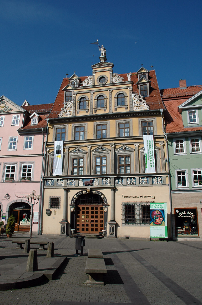 Haus zum Roten Ochsen (erstmals 1392 erwähnt) am Fischmarkt in Erfurt